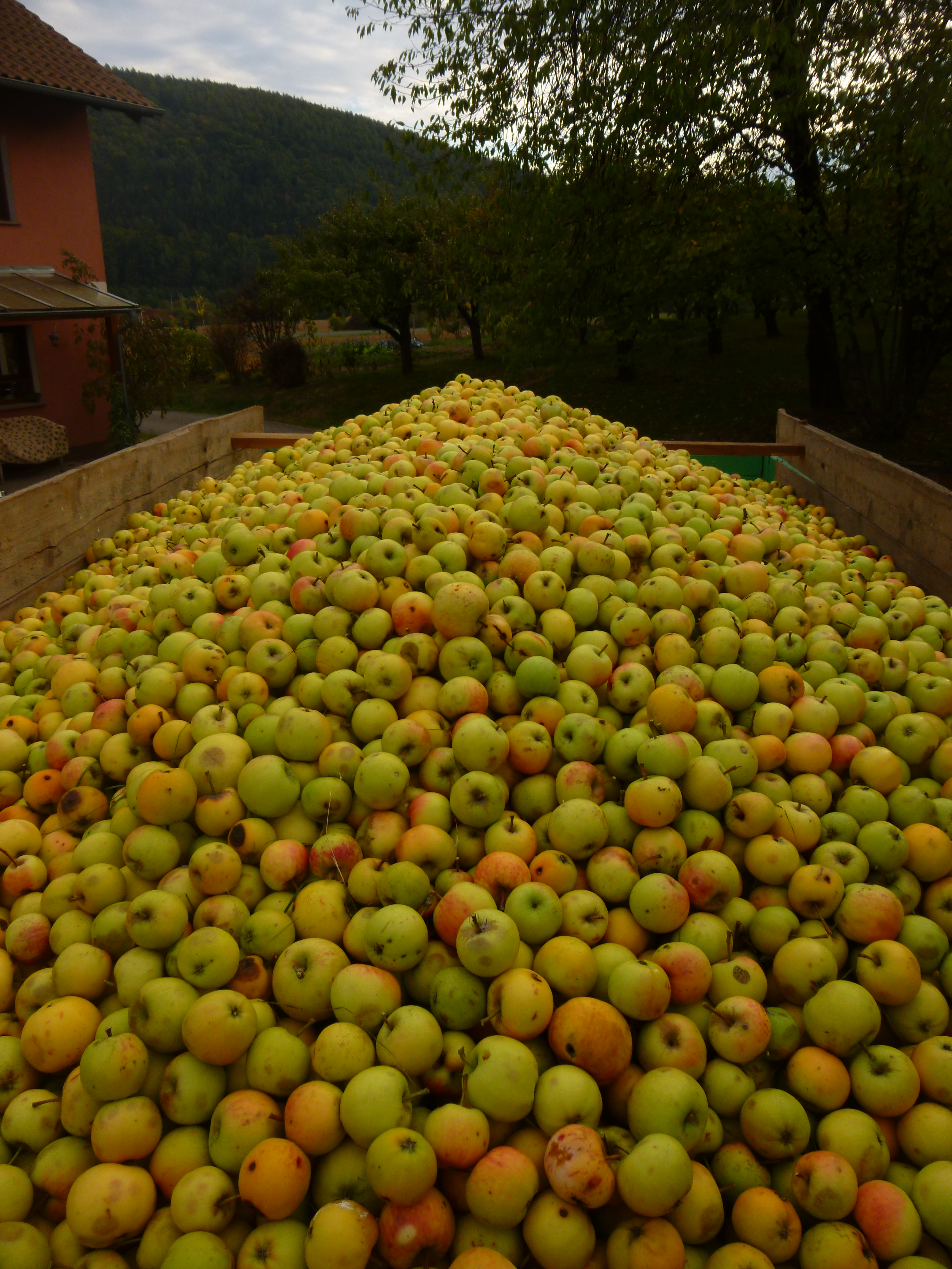 Geerntete Früchte des Bittenfelders auf einem 8 t-Hänger.